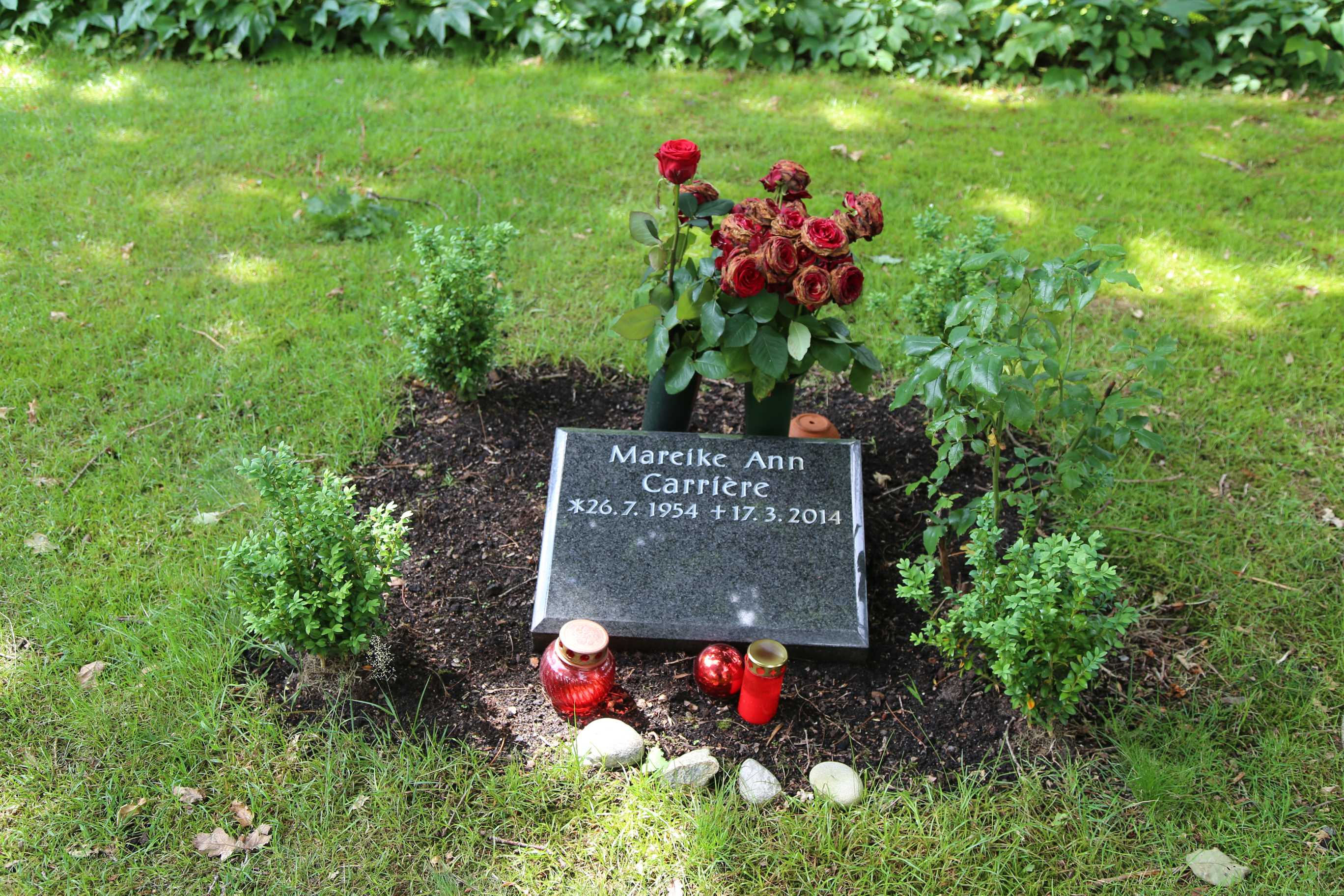 Mareike Ann Carrière (* 26. Juli 1954 in Hannover; † 17. März 2014[1] in Hamburg[2]) war eine deutsche Schauspielerin. Sie war auch als Hörspielsprecherin, Atemtherapeutin und Coach tätig.